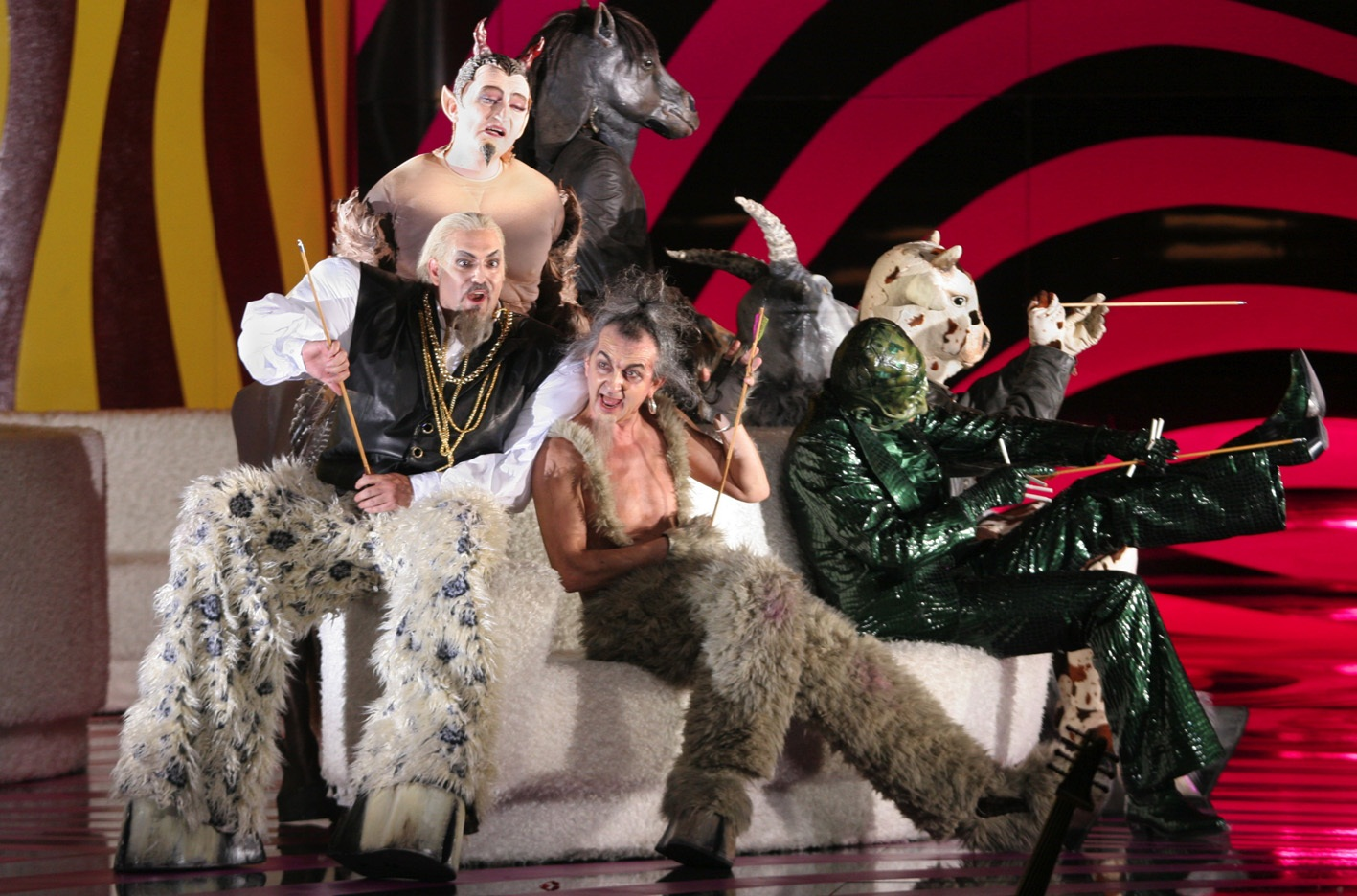 לה קליסטו 2004